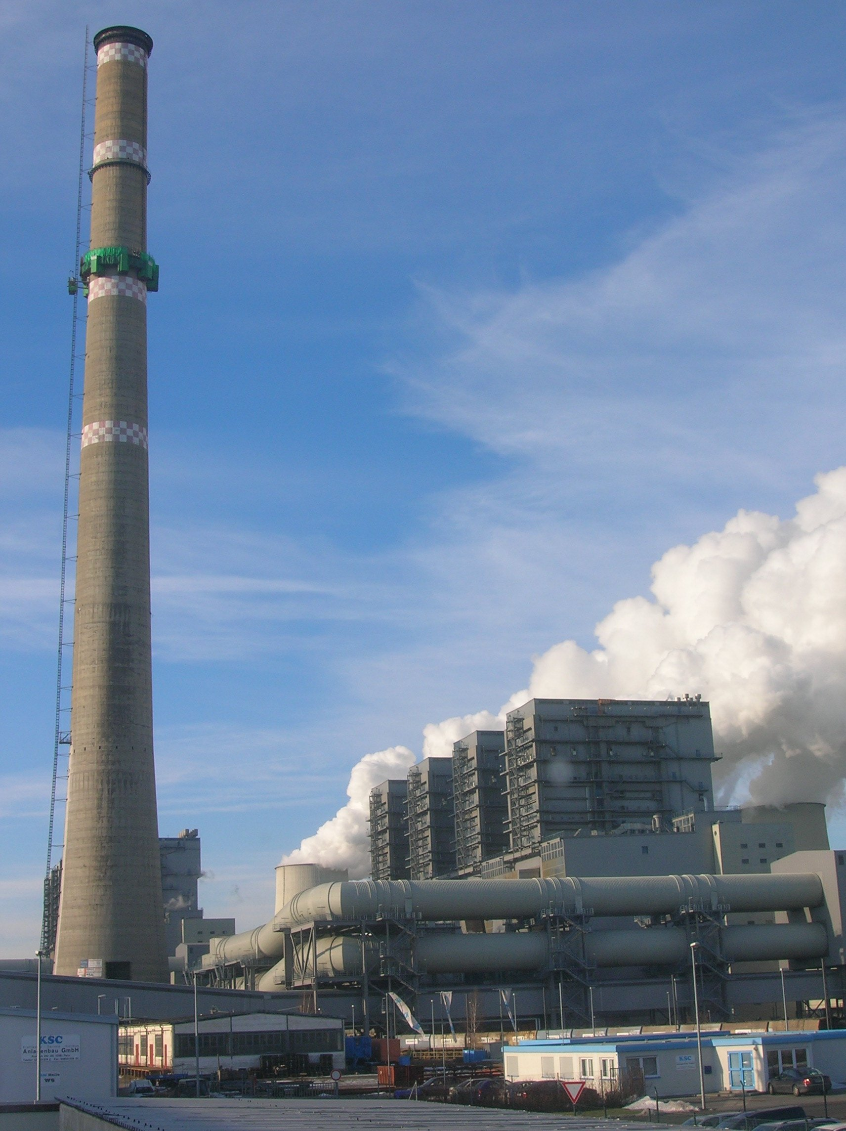 Description